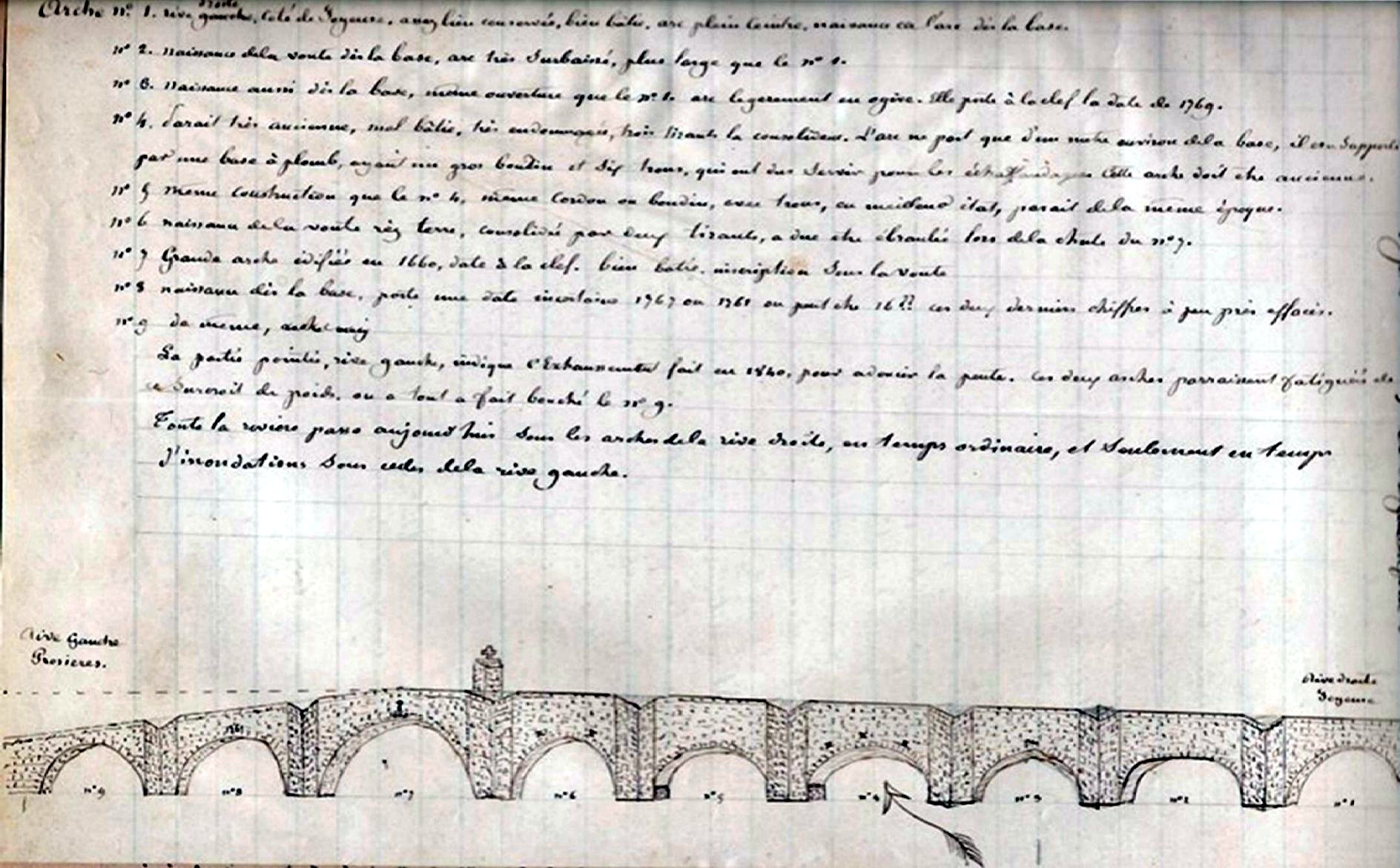 Dessin à la plume du vicomte Louis de Montravel dans ses Annales de Joyeuse.